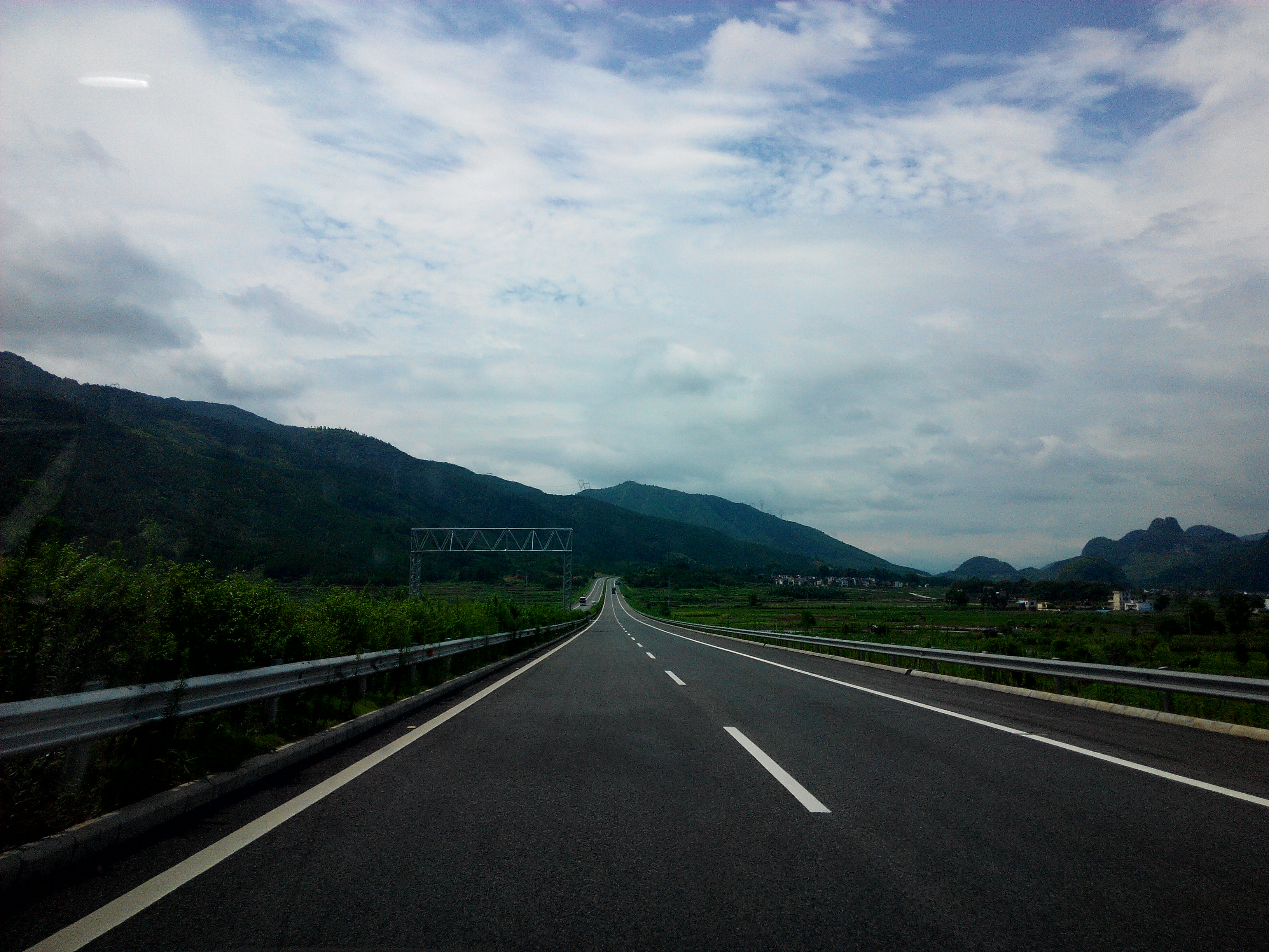 中国高速G55 二连浩特方向 连州市路段